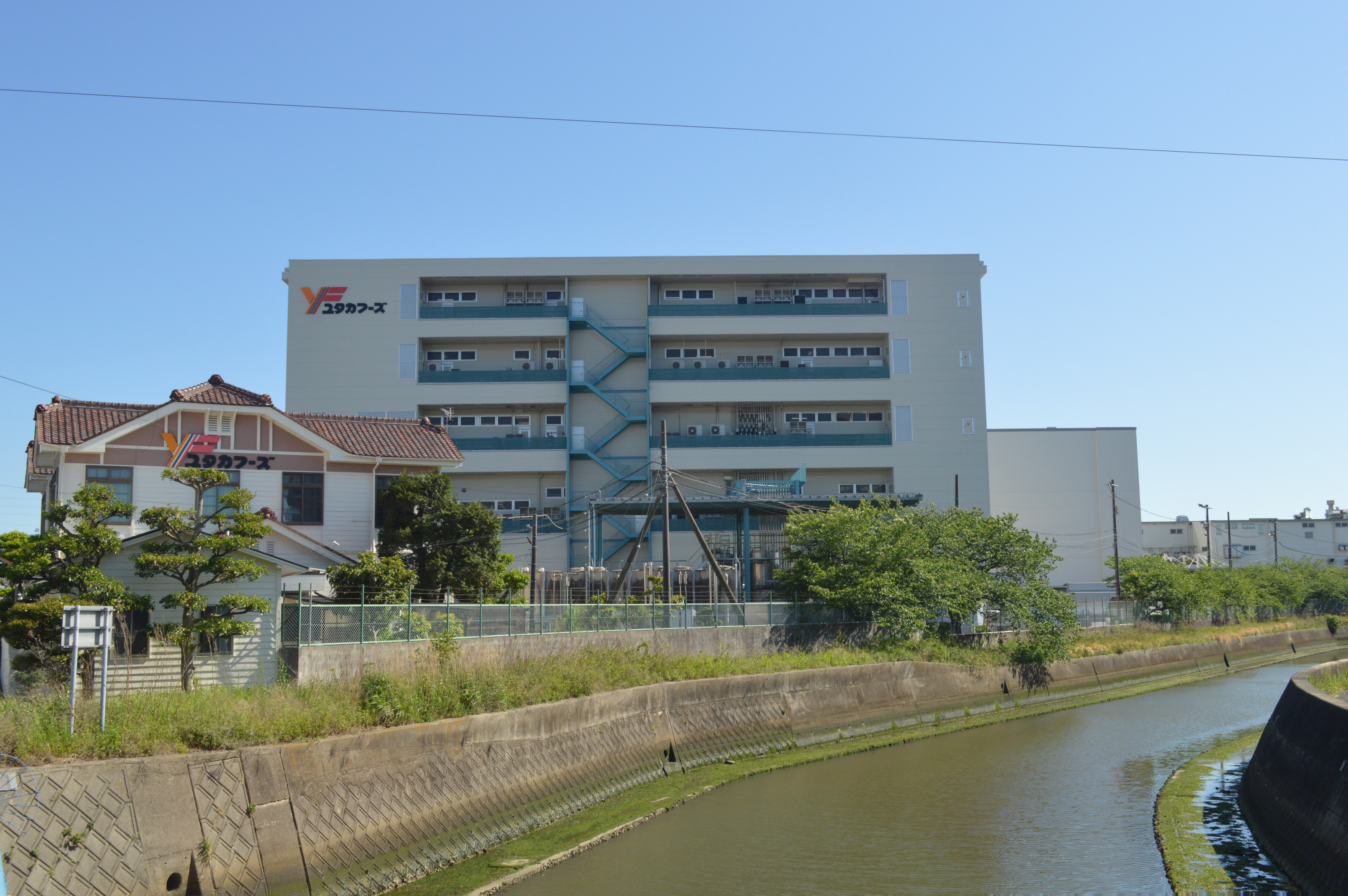 愛知県知多郡武豊町字川脇34-1にあるユタカフーズ株式会社。手前は堀川。